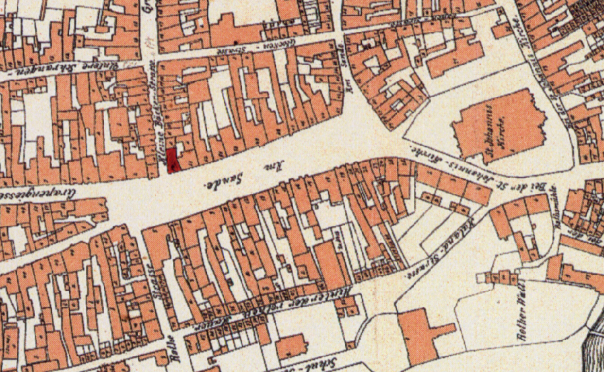 Lüneburg, Platz Am Sande und Johanniskirche Genordeter Ausschnitt aus: Plan der Stadt Lüneburg, Grundriss, 1889 (NLA-HSTAH, 32 k, Lüneburg, 58 pg), siehe File:Lüneburg Plan 1889.jpg